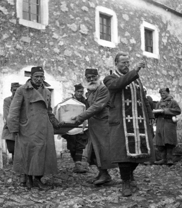 Komandanta Treće divizije Pera Ćetkovica, koji je poginuo u borbama oko Nevesinja, sahranili su prema narodnim običajima.